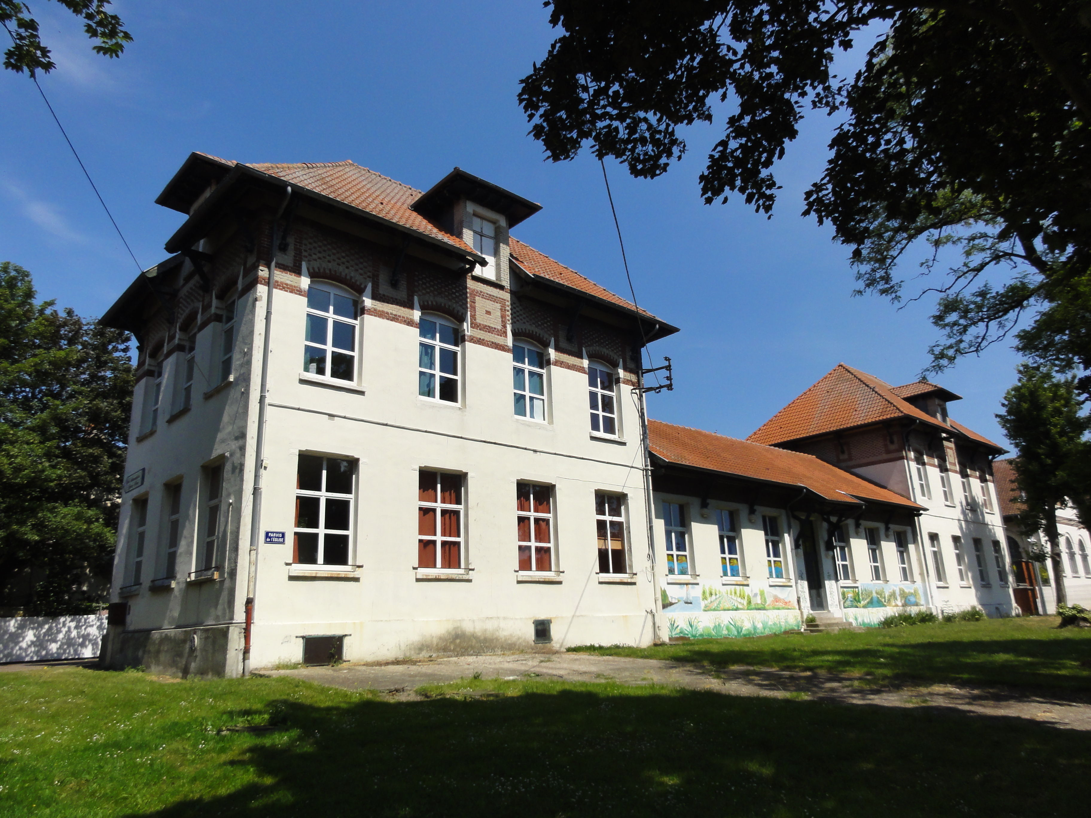 Écoles des cités de la Fosse n° 12 de la Compagnie des mines de Lens, Lens, Pas-de-Calais, Nord-Pas-de-Calais, France.